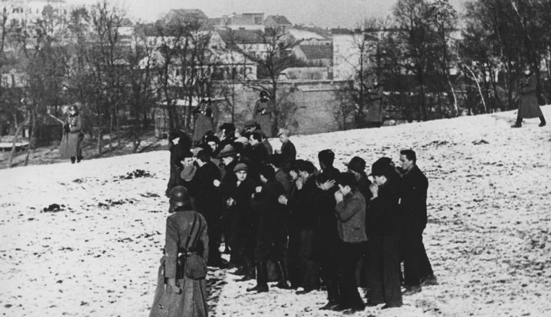 Egzekucja Polaków przez Niemców podczas II wojny światowej na wzgórzu Uzbornia w Bochni.